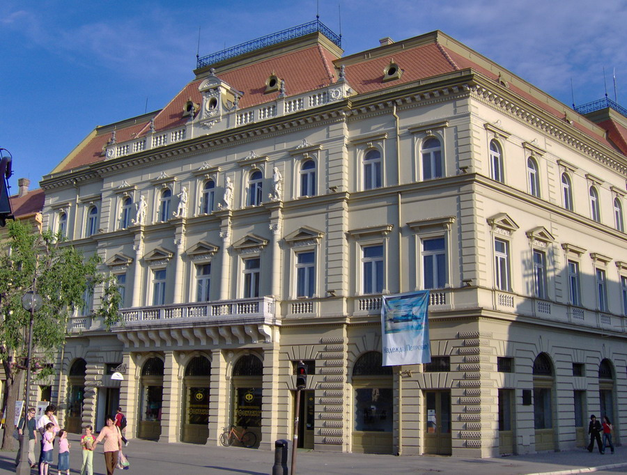 National museum in Zrenjanin